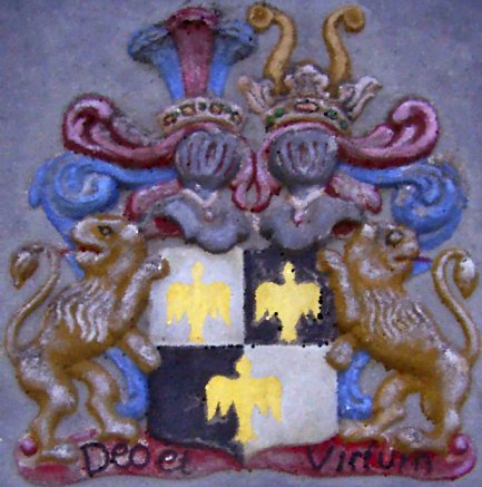 Wappen der Familie de Tubeuf in 91463 Beerbach, Herrnbergstr. 2